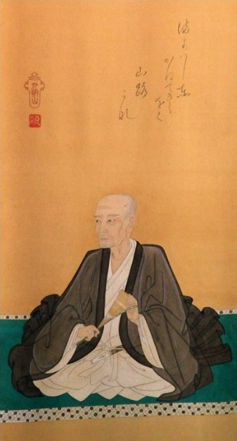 良尚入道親王の肖像。